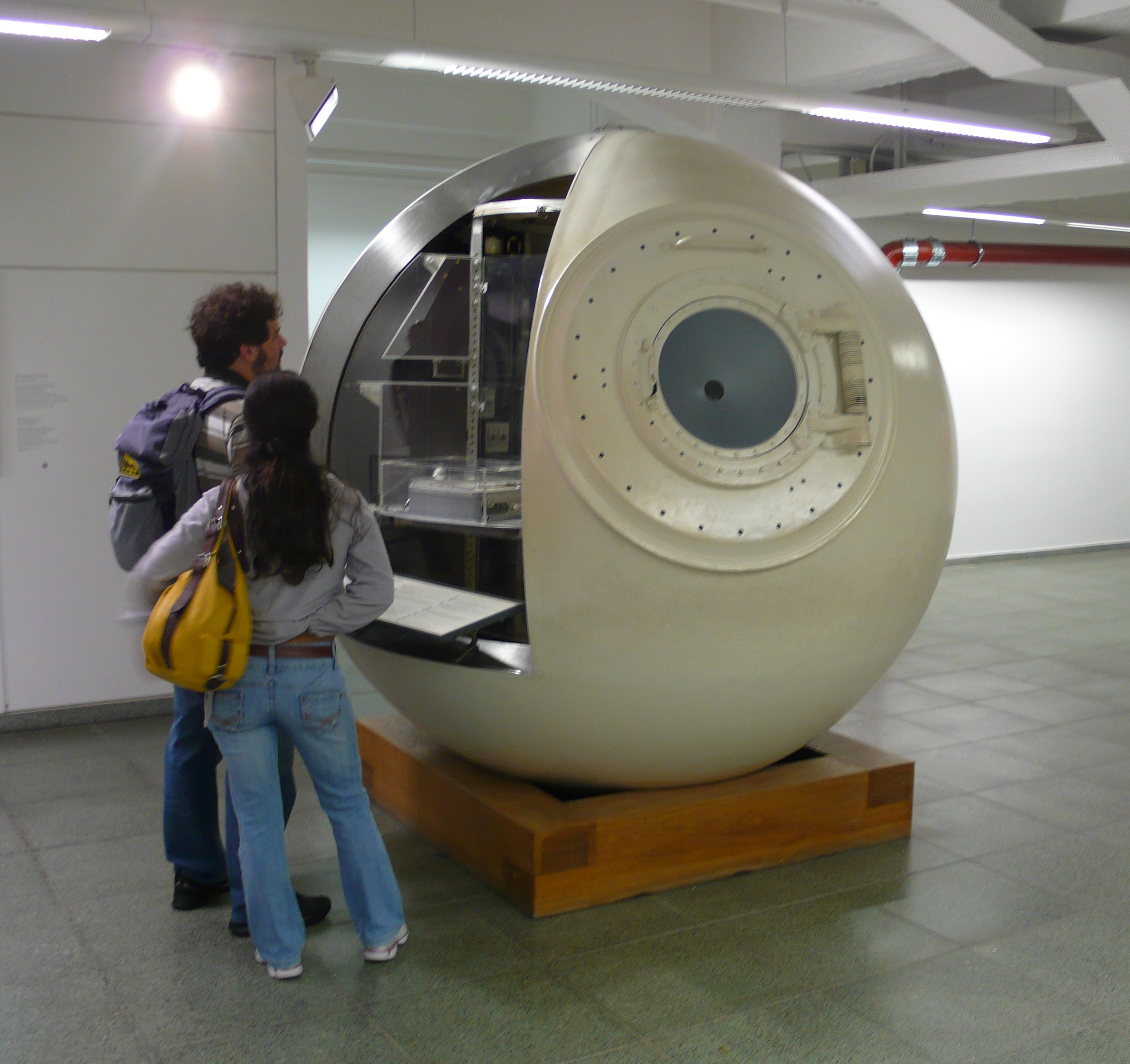 Replik der Stahlkugel der Bathyscaph Trieste